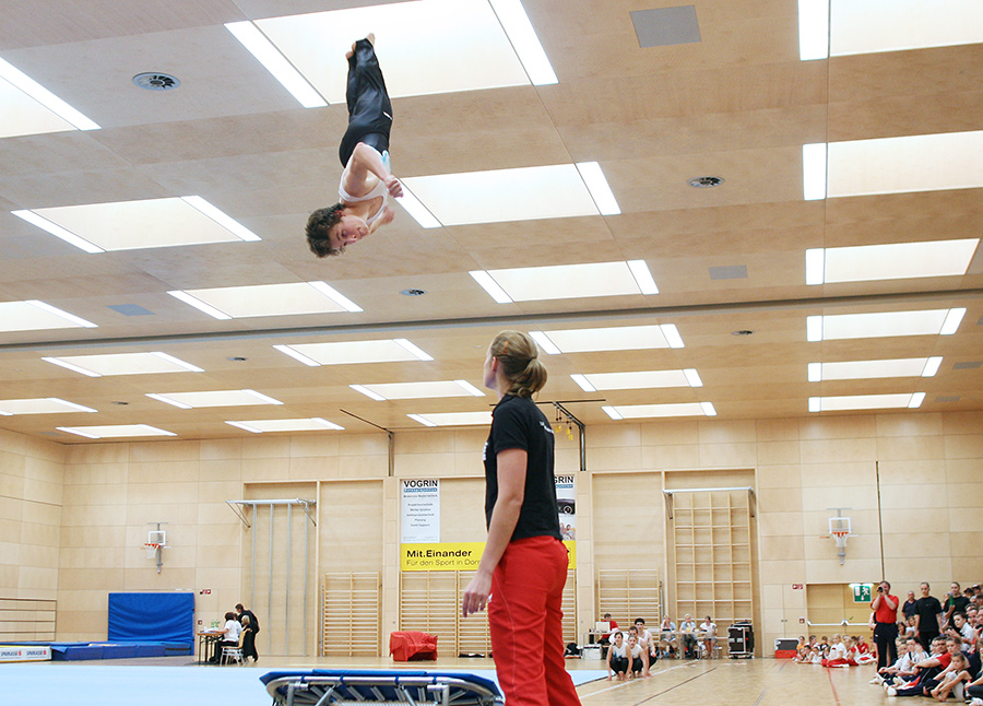 Team-Turn-Mannschaft der TS Lustenau in der Messehalle 1/Dornbirn/Vorarlberg. Wettkampf: Junior-Team-Cup.